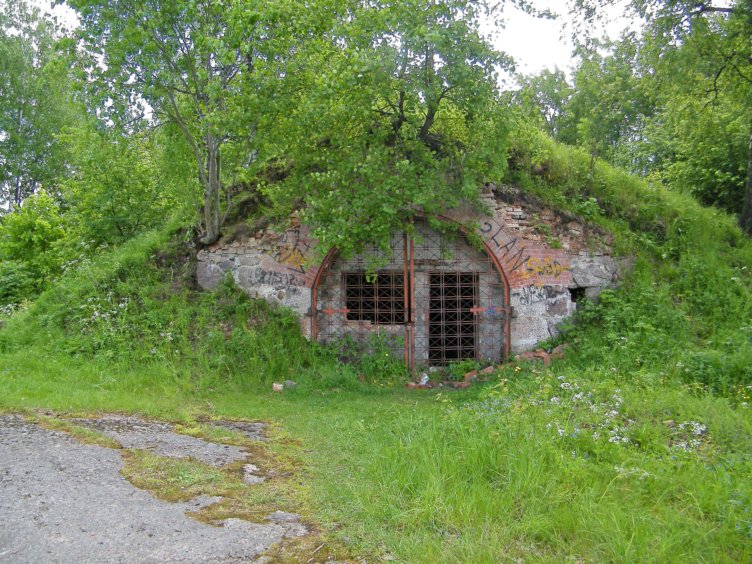 Фортификационные сооружения на Батарейной горе